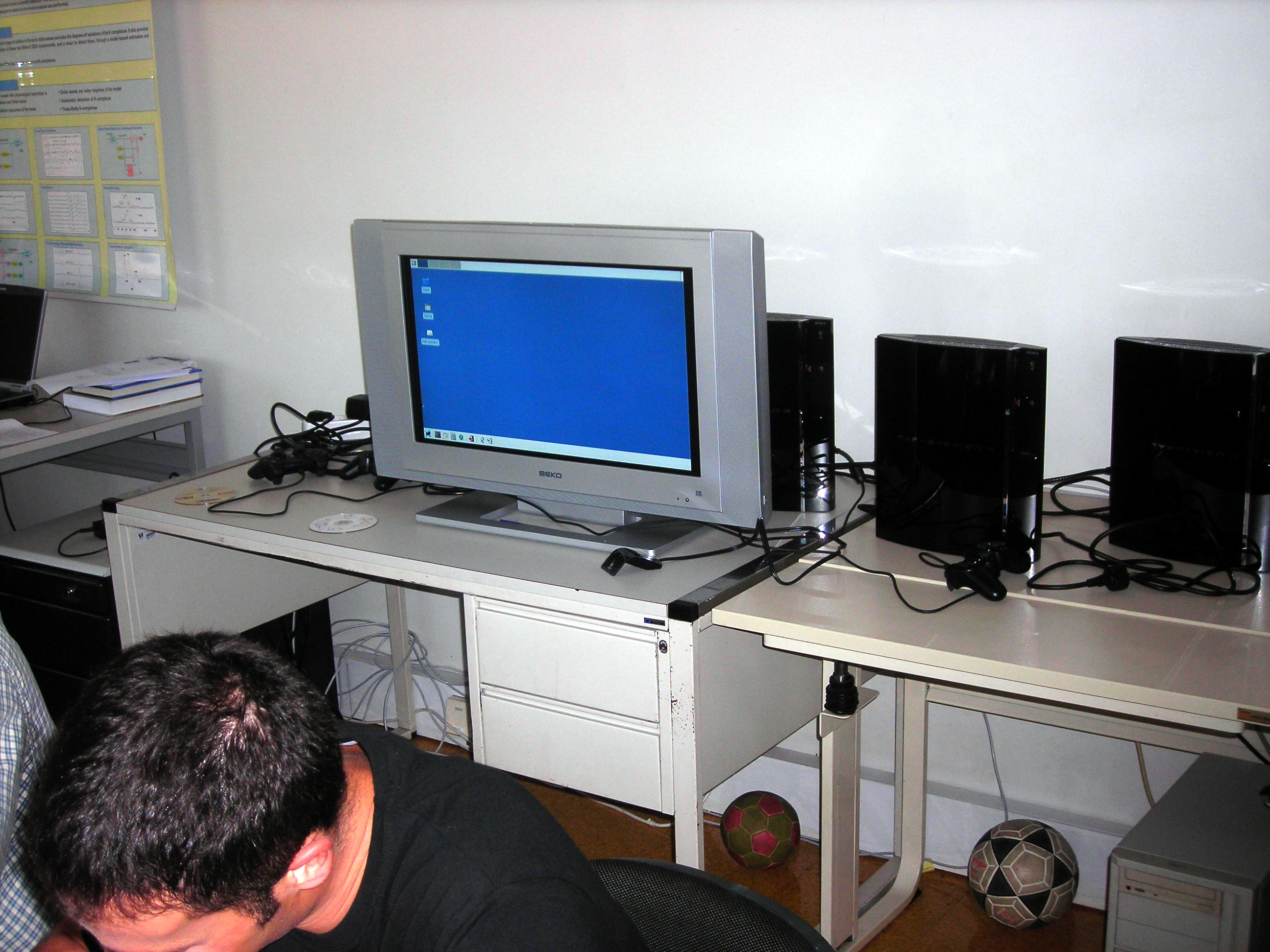 Clúster de PS3